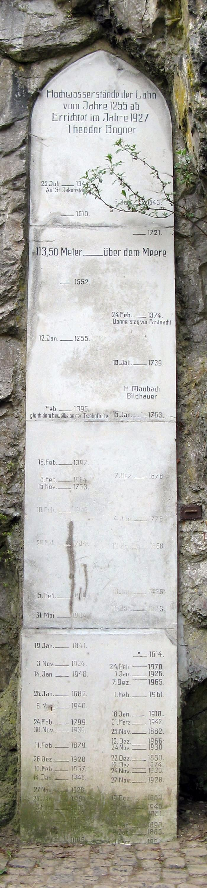 Historische Lahnhochwässer bei Limburg, Pegel am Domfelsen